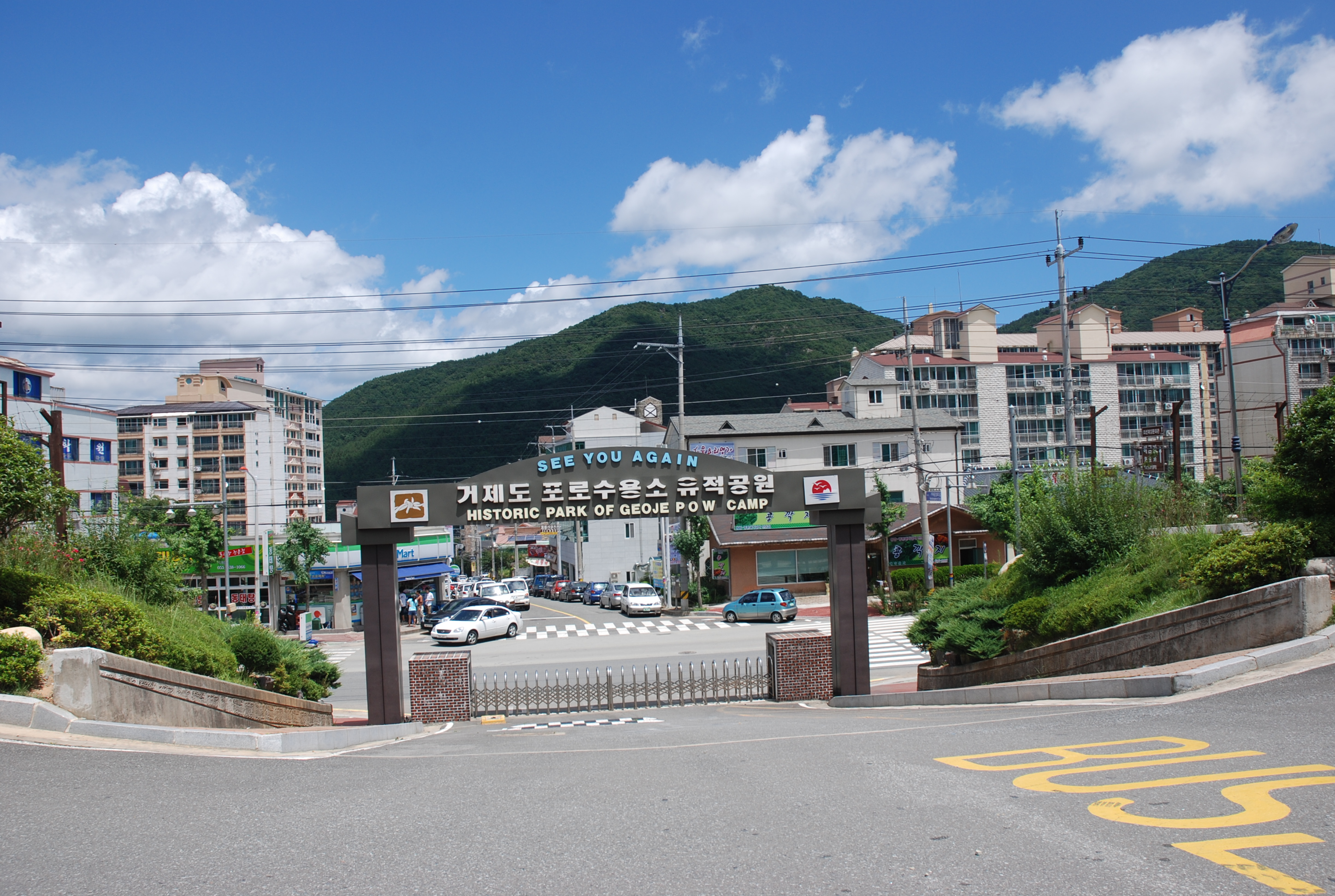 Geoje POW Camp Entrance